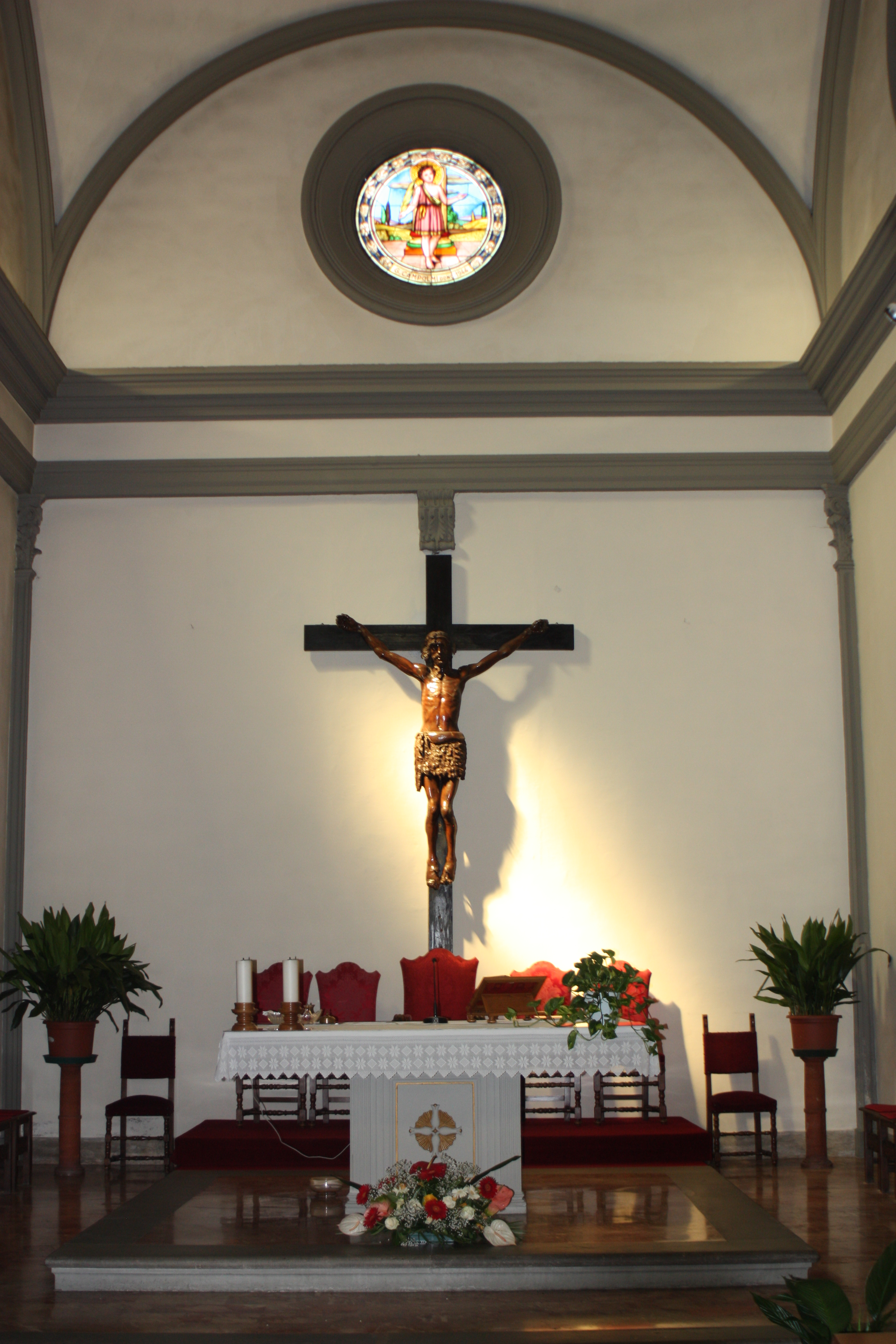 Presbiterio della Chiesa di San Quirico a Legnaia; si notano l'altare maggiore, il crocifisso in legno e il rosone dedicato a San Quirico